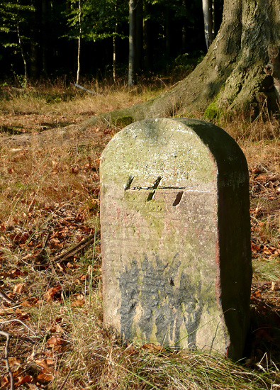 Wolfsangel an einem Grenzstein im Deister